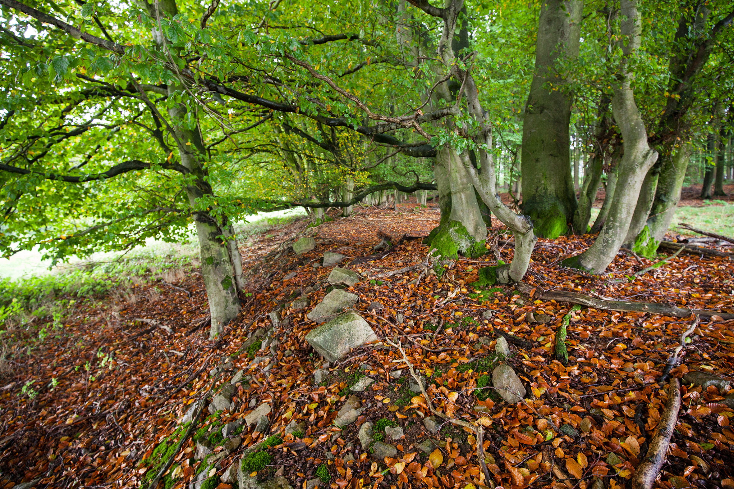 Mit Bäumen bewachsener Steinwall (Bodendenkmal) auf dem Buntenberg bei Göstrup im Extertal, Kreis Lippe.